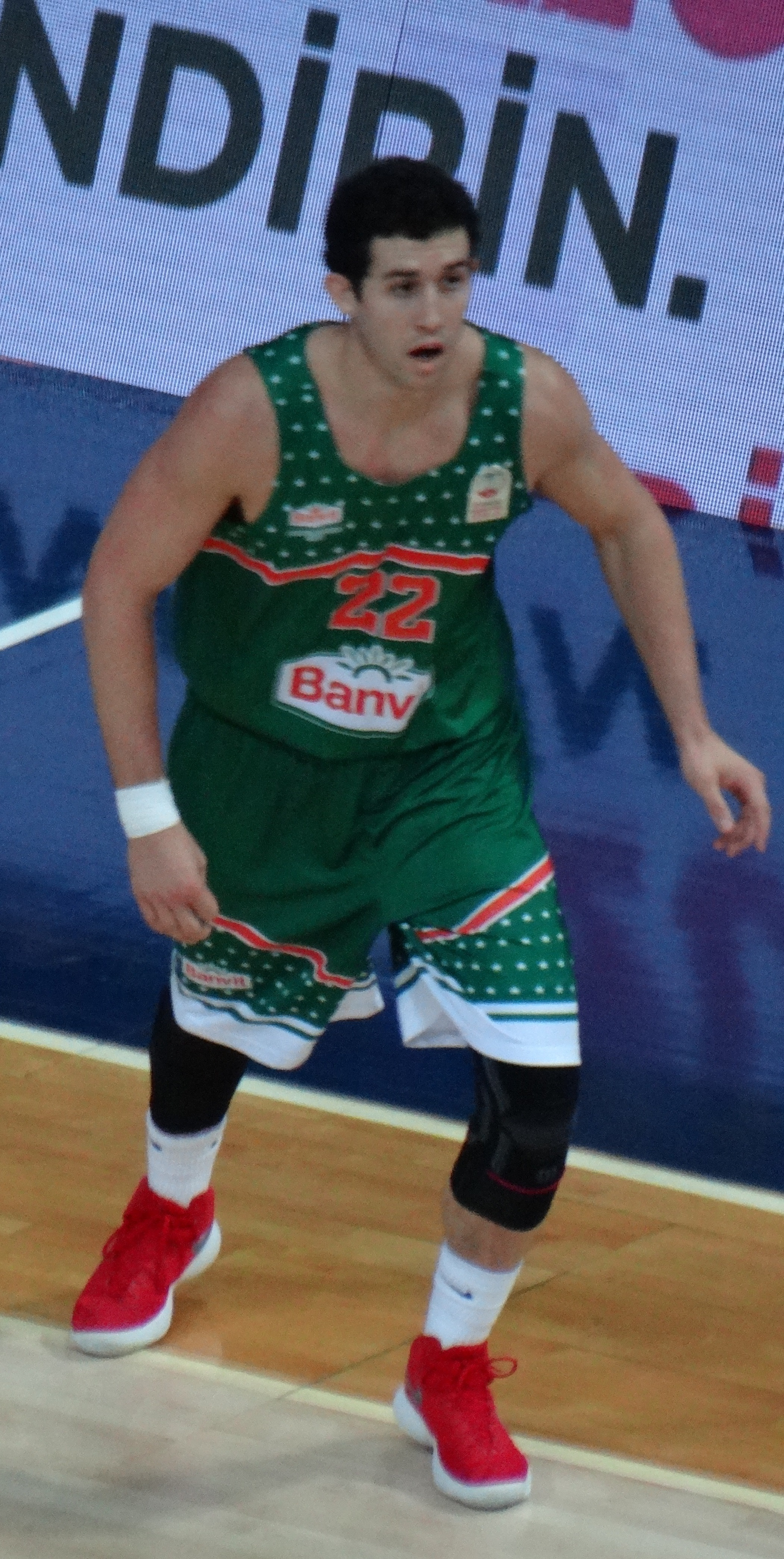 Angelo Caloiaro 20171007